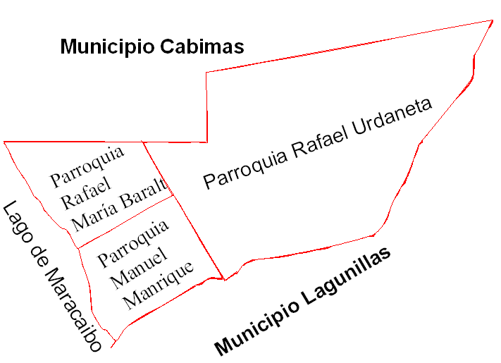 Parroquias del Municipio Simón Bolívar Zulia Venezuela